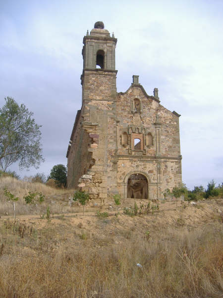 Convento de Nuestra Señora del Valle en San Román del Valle, Villabrázaro, Zamora, España